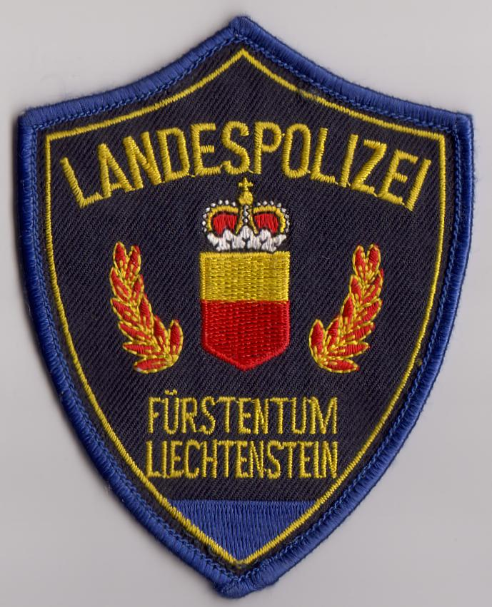 Liechtenstein policepatch